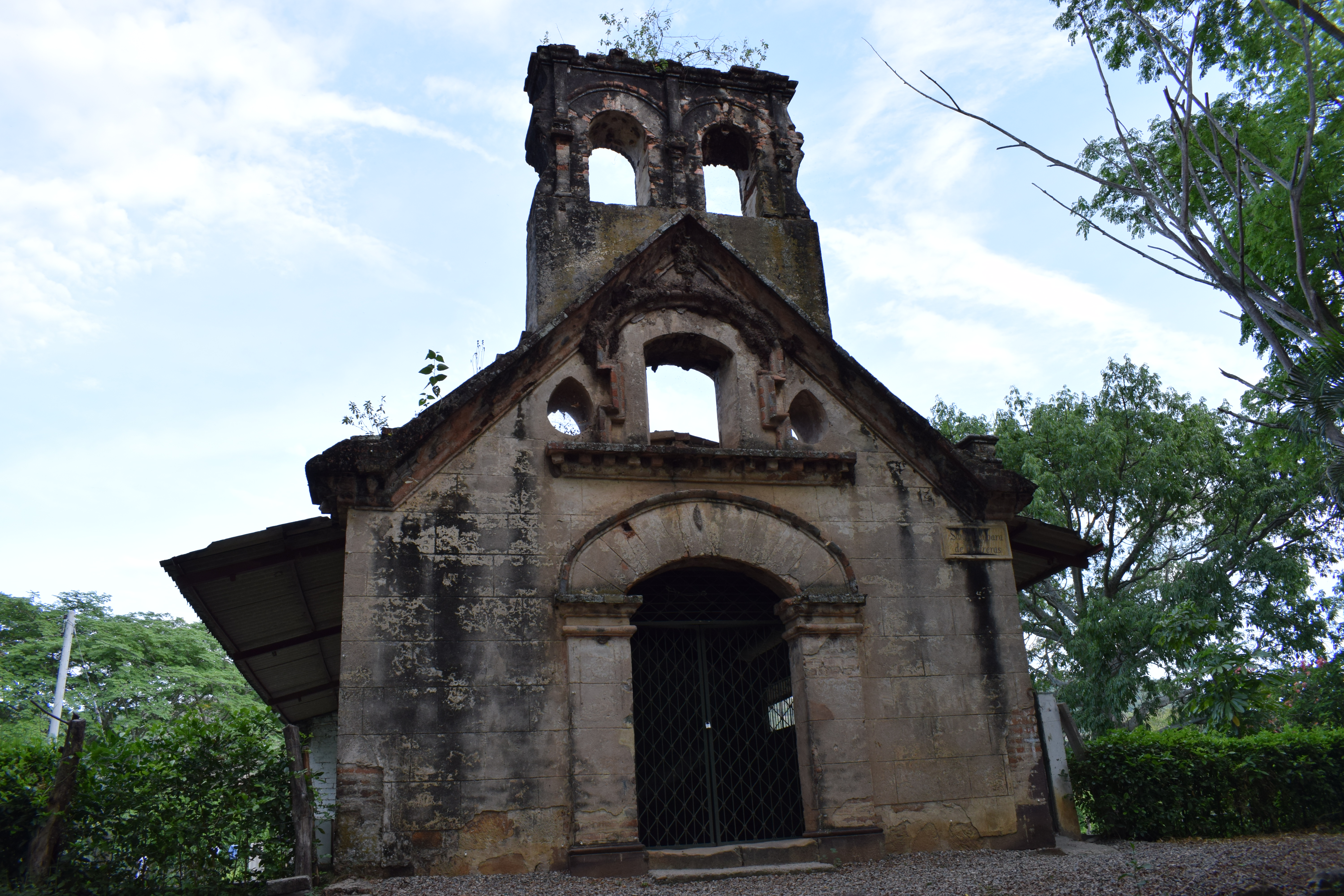 Foto de la fachada de la Iglesia de Santa Bárbara de Contreras, situada en el municipio de San Luis (Tolima) en Colombia. La fachada es lo único que queda en pie.